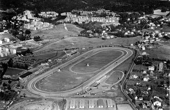 Bjerkebanen i Oslo. Staller i forgrunnen. Økernveien til høyre.